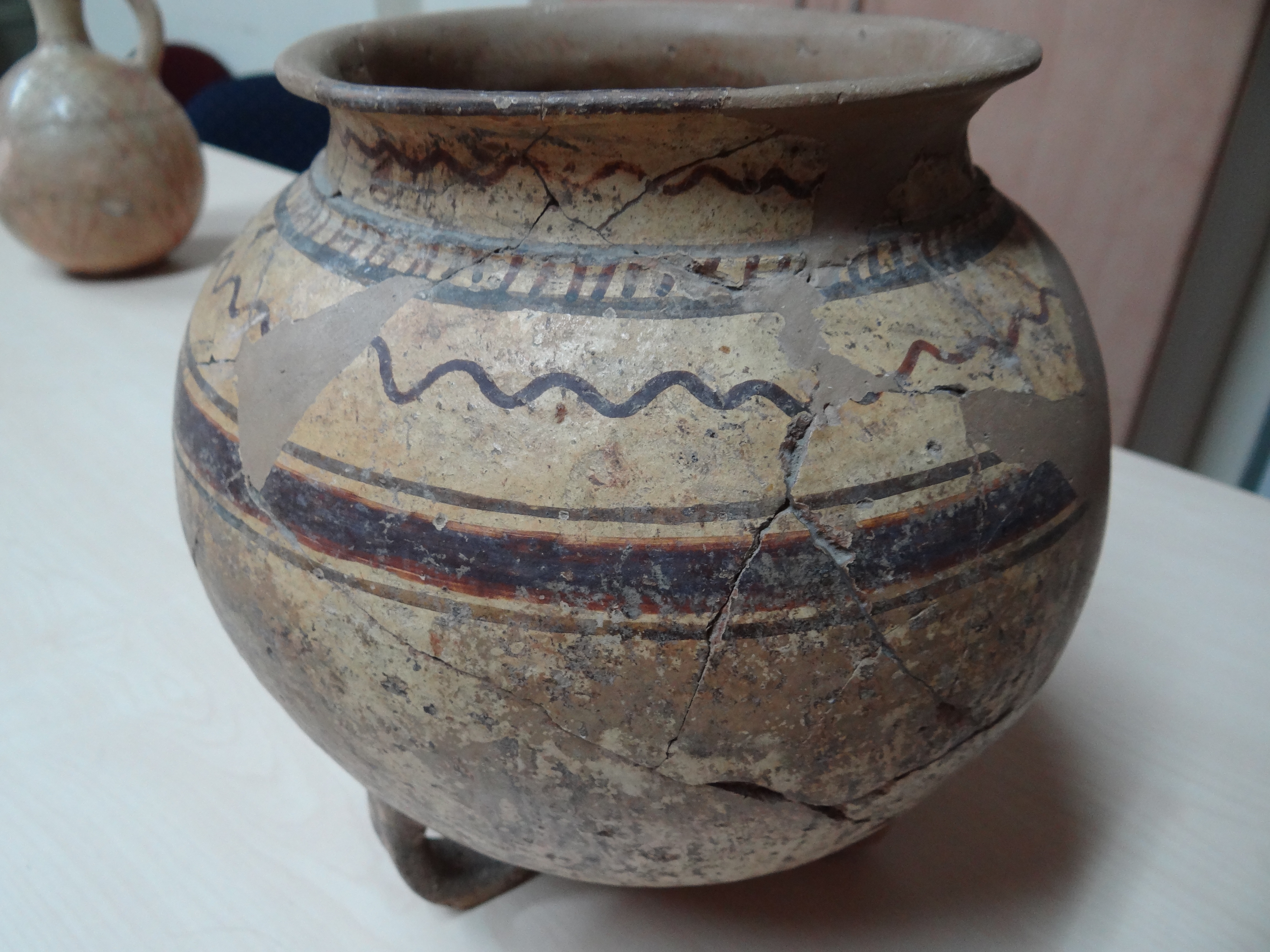 Chocolate-on-White ware is the description commonly given to an important diagnostic ceramic type. The pictures were taken in the collections room of the Department of Archaeology University of Haifa Chocolate on white ware jug משפחת שוקולד על לבן הוא שמה של משפחה קרמית מתקופת הברונזה התיכונה 2 ב' (MB IIb) והברונזה המאוחרת 1 קנקן התמונות צולמו בחדר האוספים של החוג לארכאולוגיה באוניברסיטת חיפה